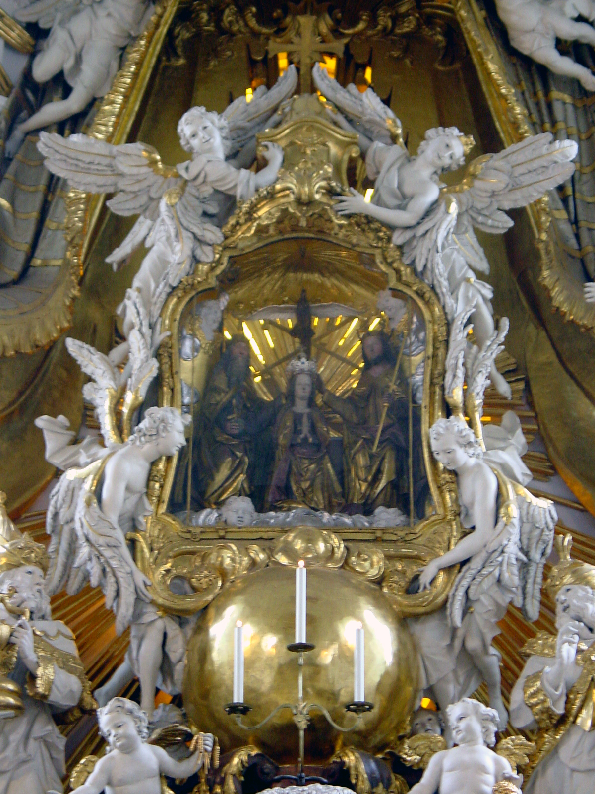 Gnadenbild in der Wallfahrtsbasilika Gößweinstein